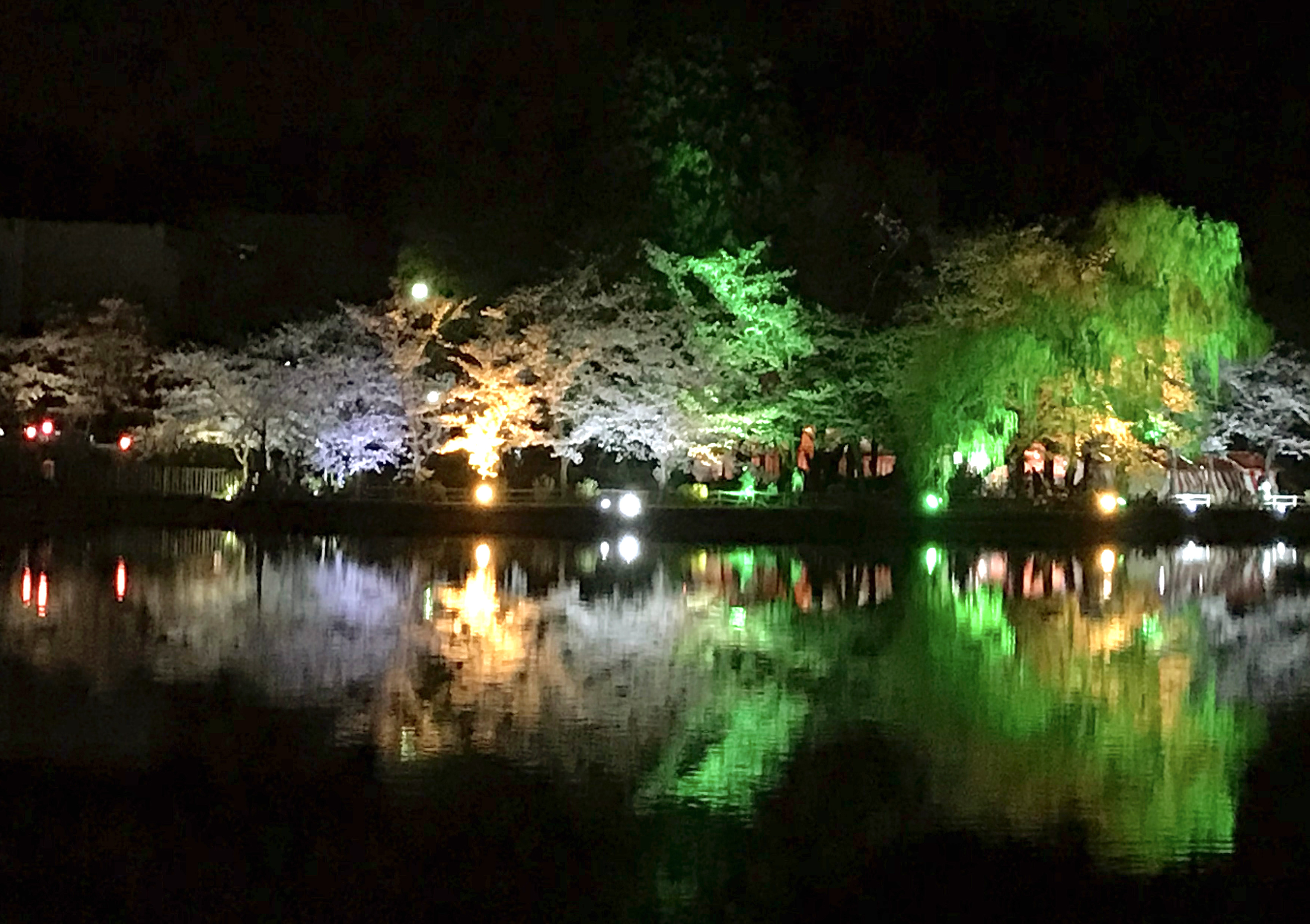 八鶴湖桜まつりライトアップ（18/3撮影）